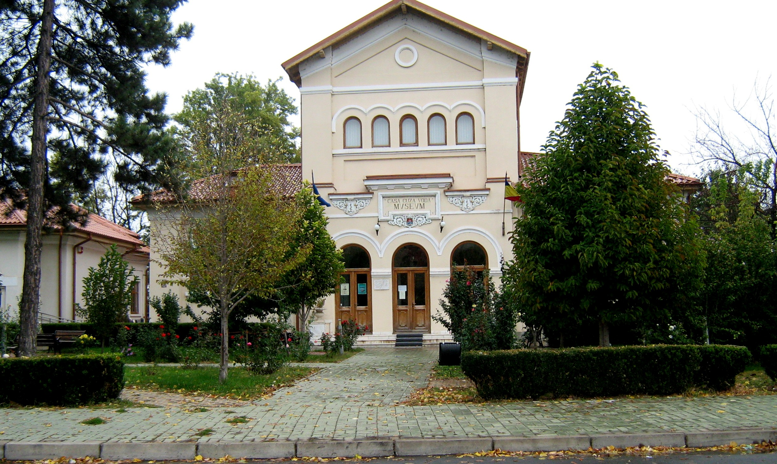 Casa Cuza Voda azi Muzeul Judetean de Istorie